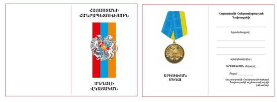 Արիության մեդալի վկայական